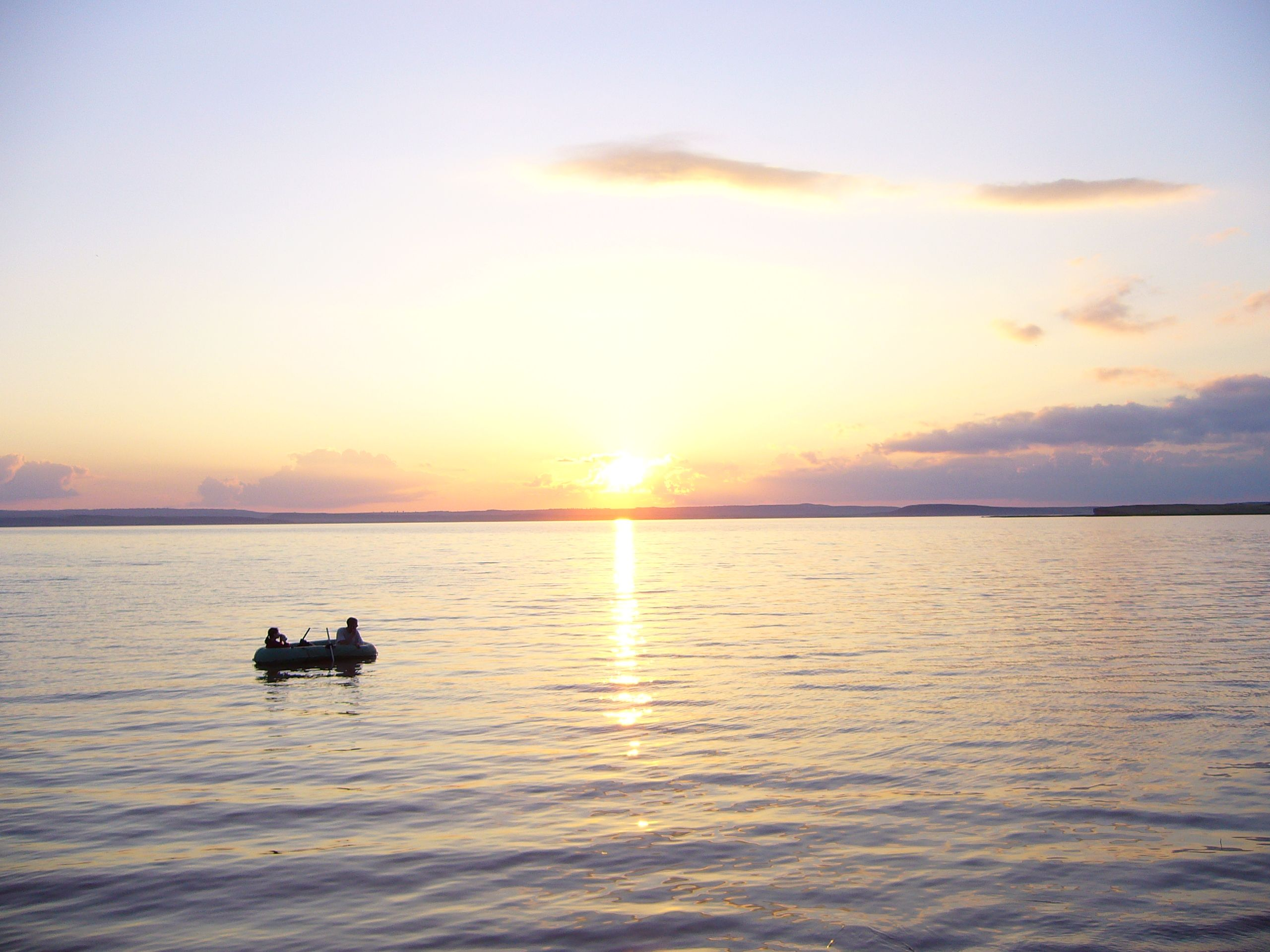 Озеро Аслы-Куль